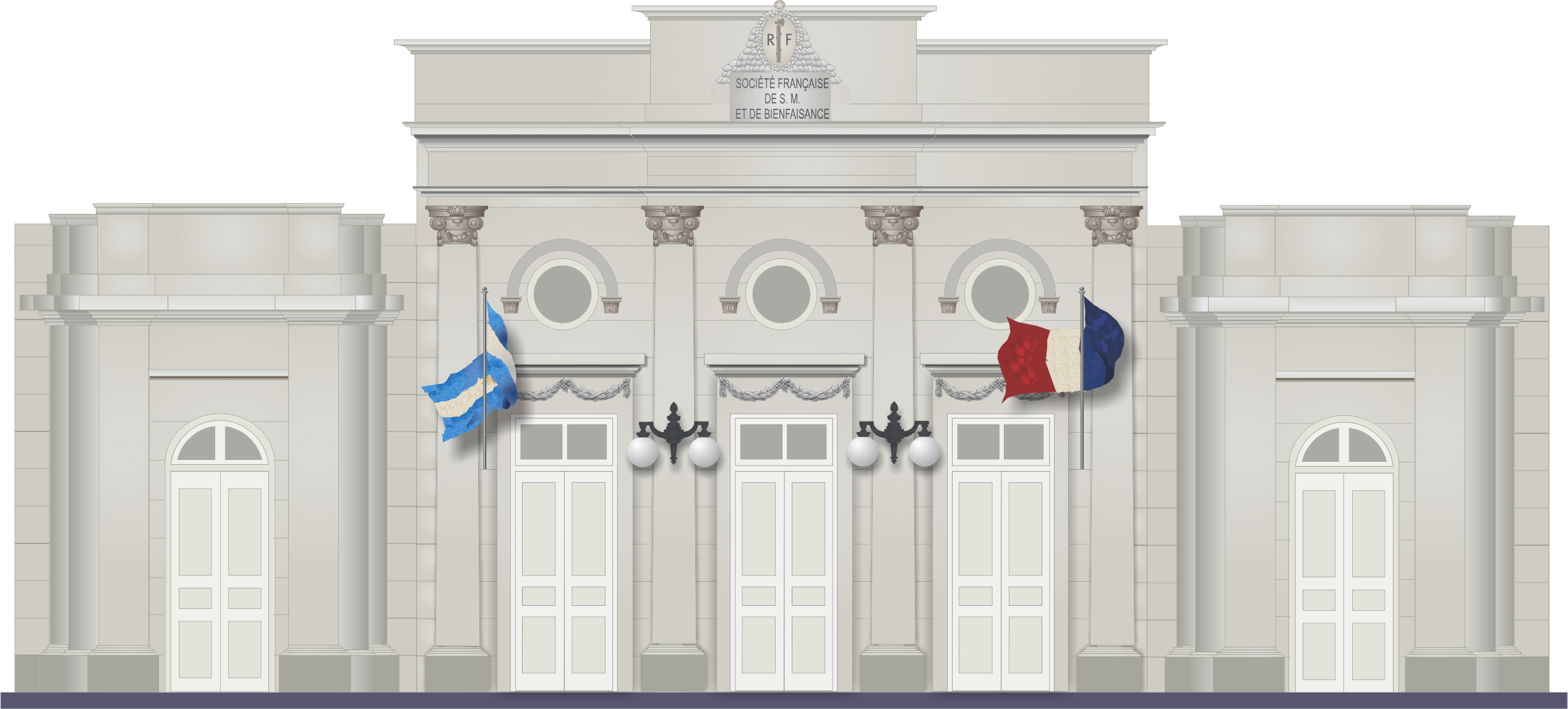 Sede de San Juan 751, inaugurada por Clodomir Hileret, el 14 de julio de 1895.